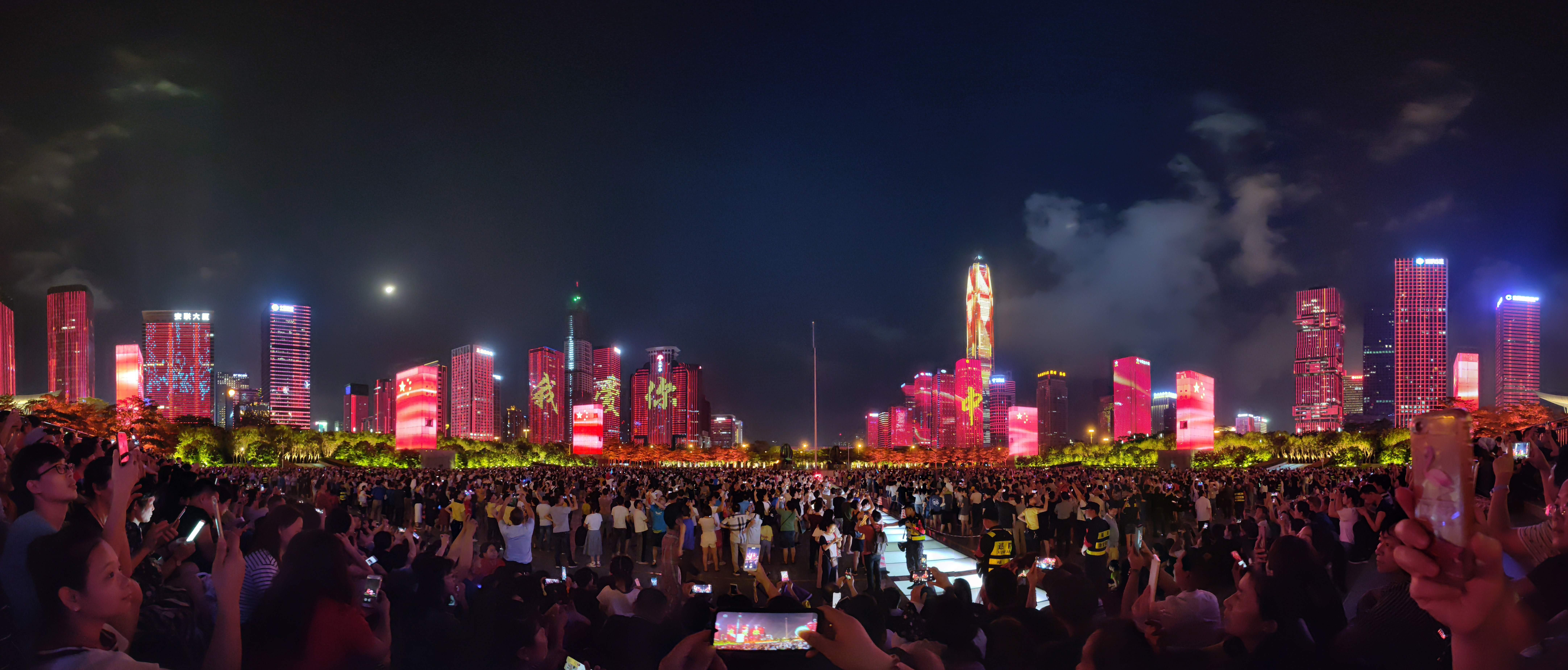 深圳灯光秀